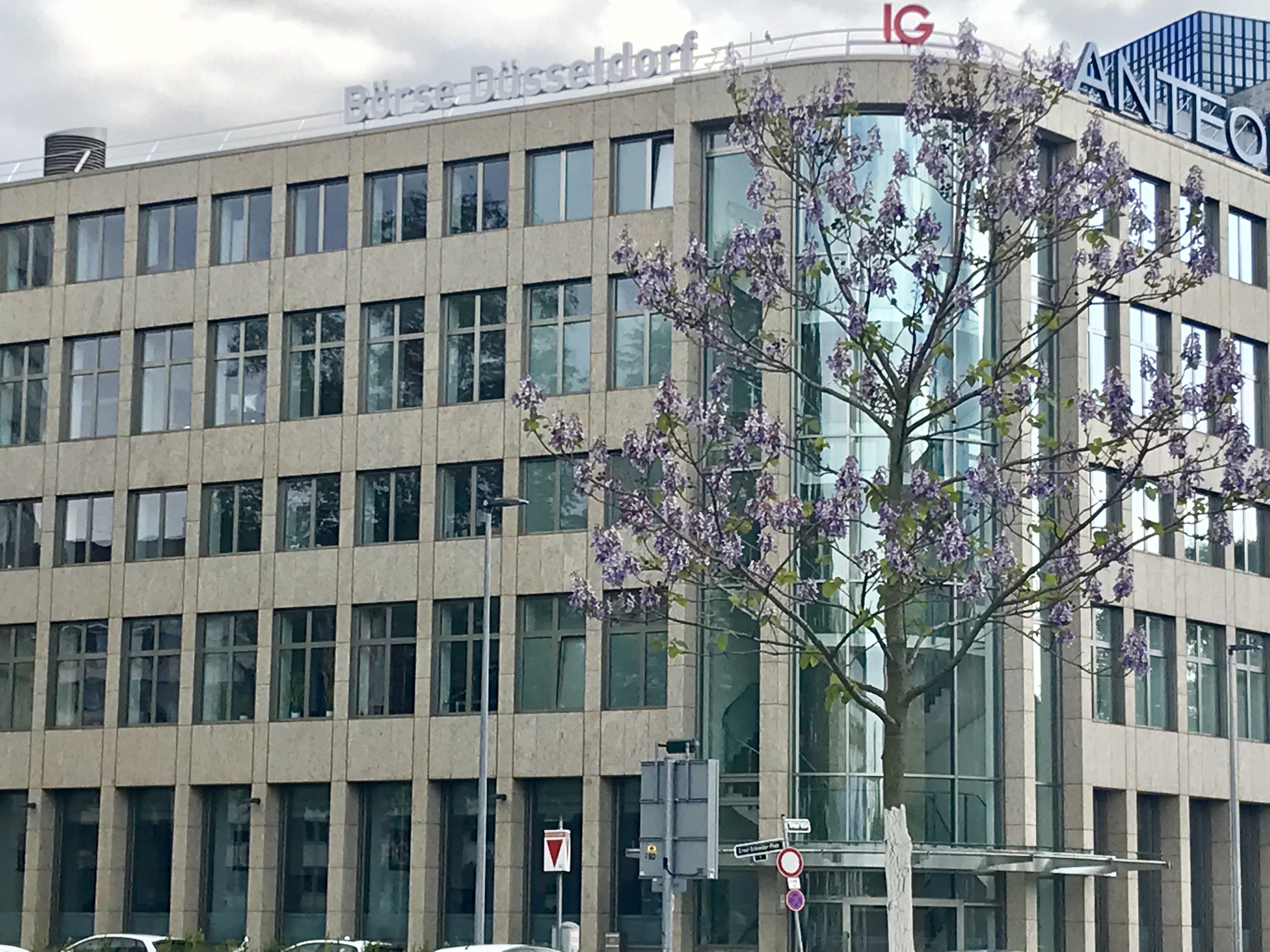 Gebäude der Börse Düsseldorf, Ernst-Schneider-Platz 1